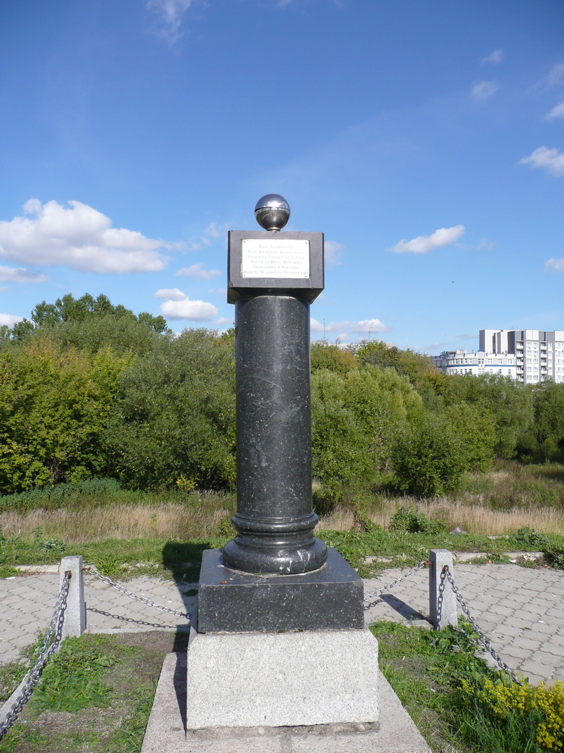 Golovinsky Column in Tver (1867)